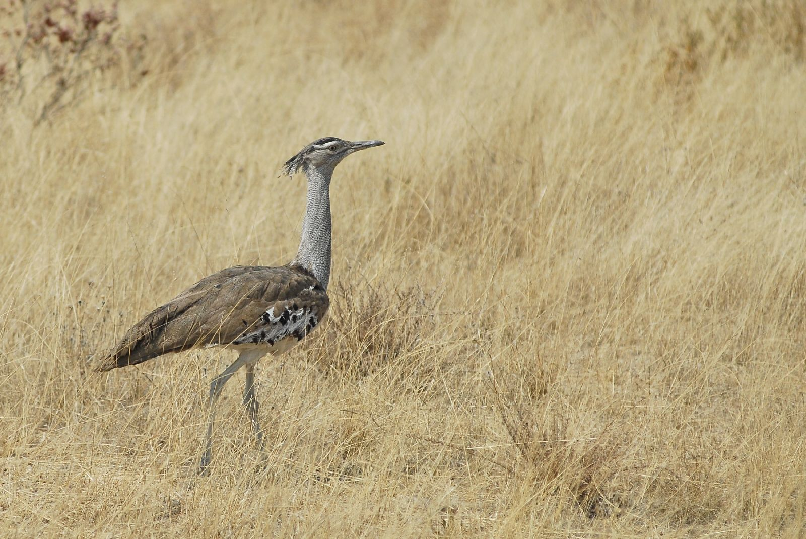 Namibie, Namibia, Etosha